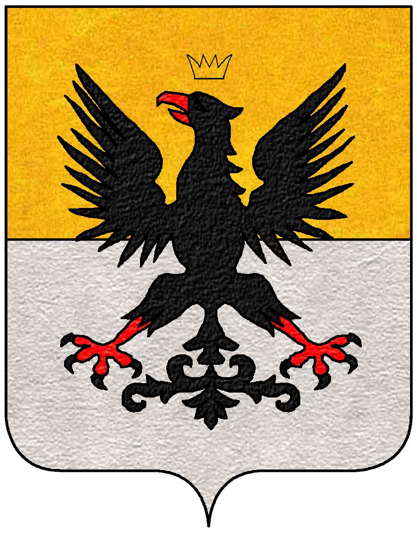 Stemma della famiglia Doria